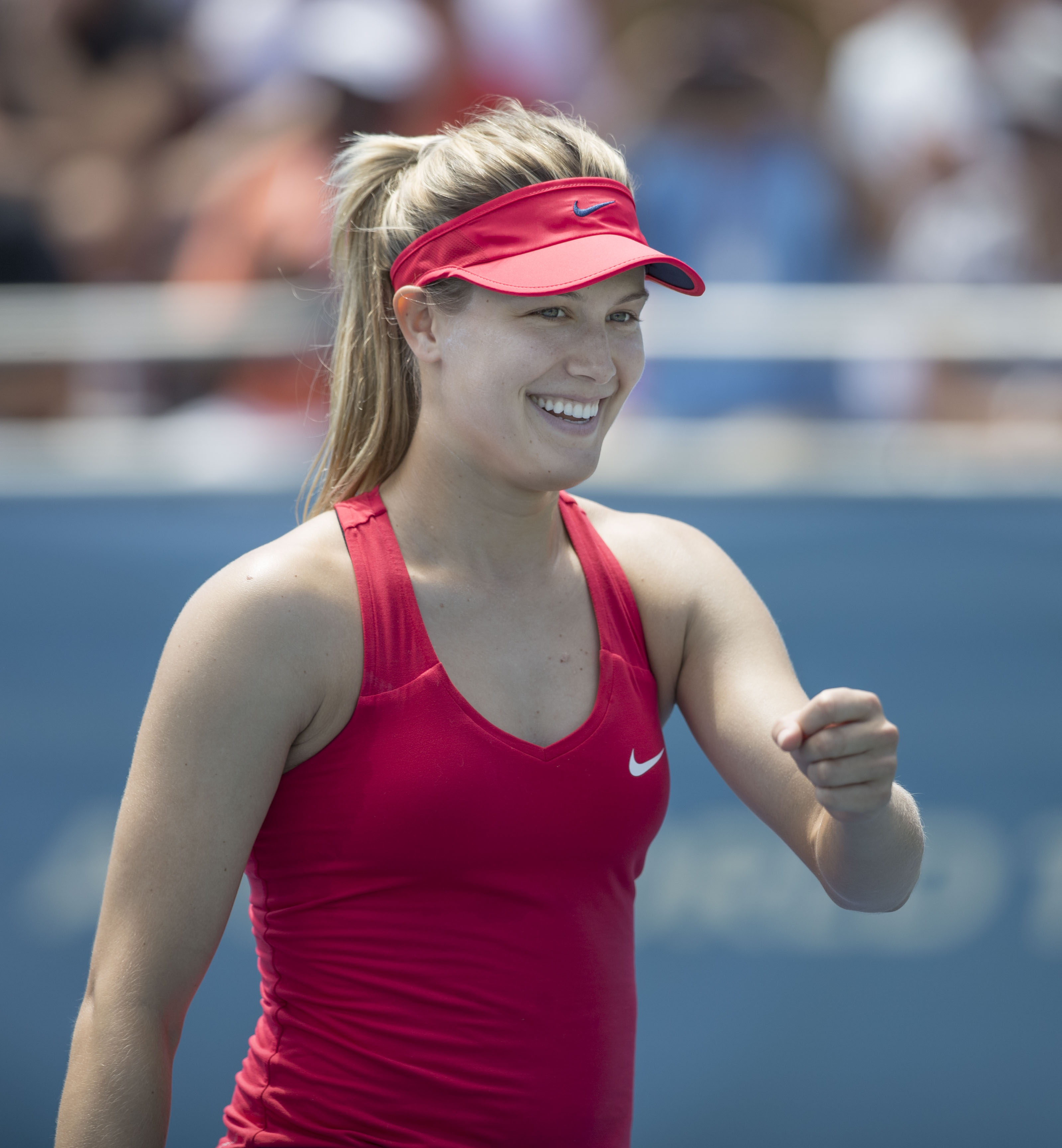 Citi Open Tennis 2017